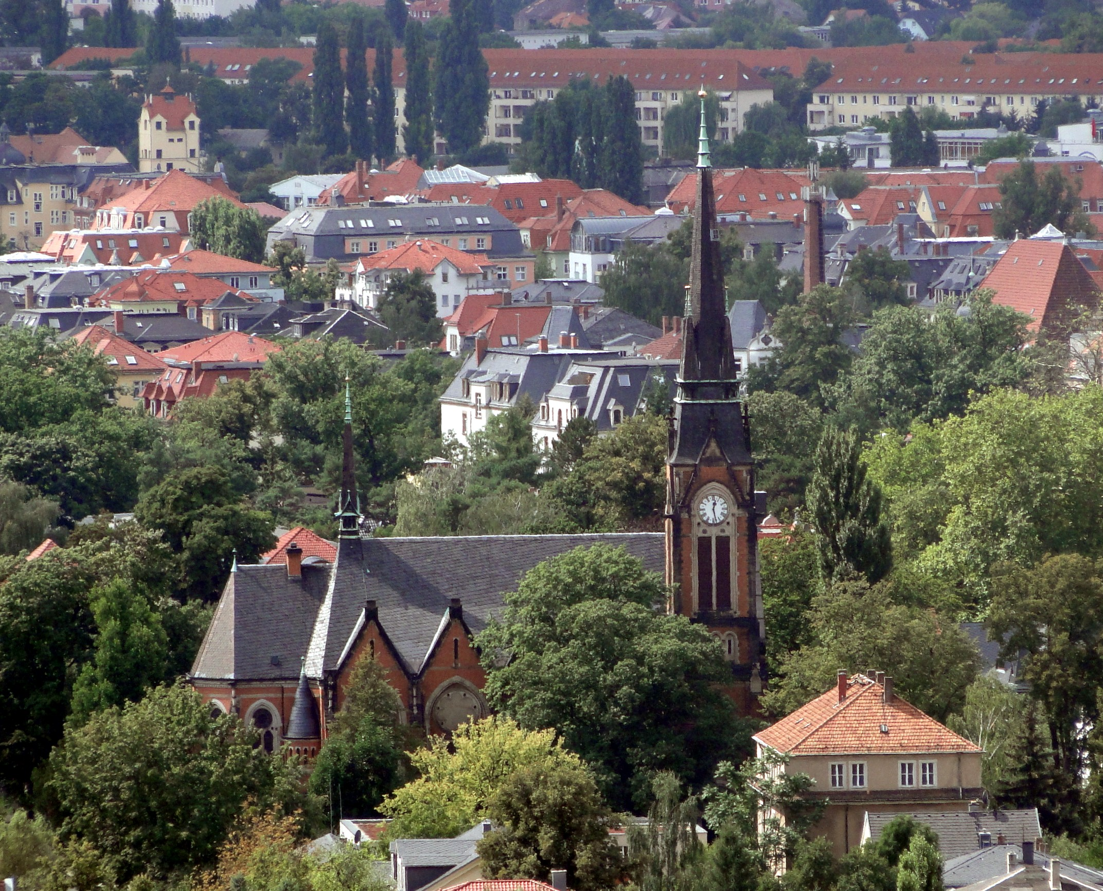 Heilig-Geist-Kirche in Blasewitz, gezoomt aufgenommen von der oberen Station der Schwebebahn in Dresden-Loschwitz